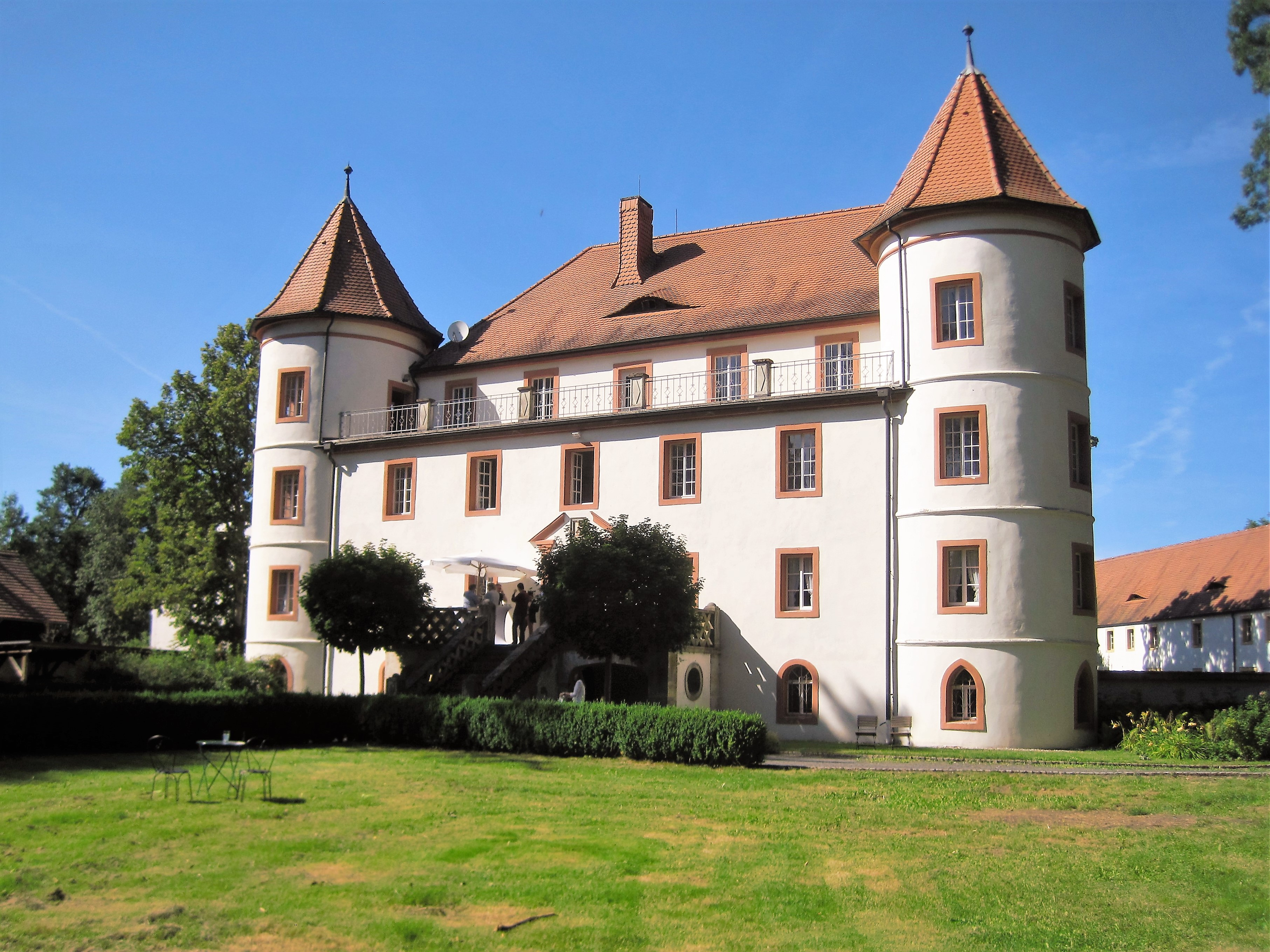 Schloss Wolframshof in 95506 Wolframshof Bayern